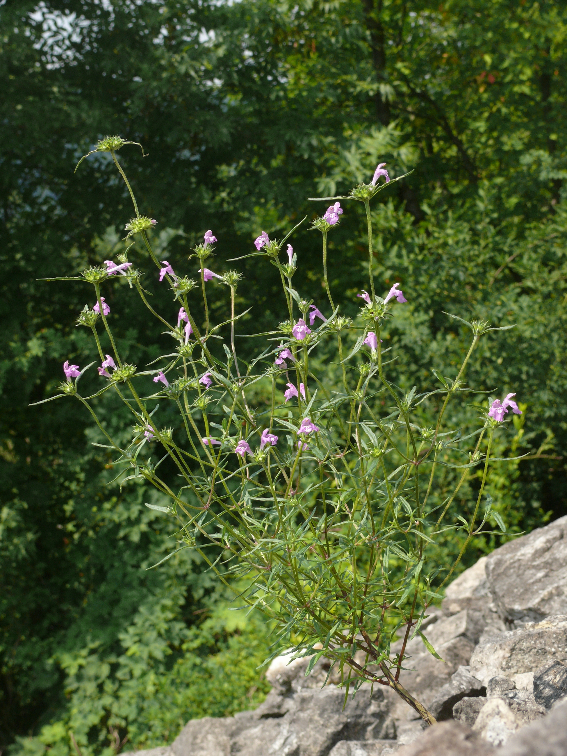 Galeopsis angustifolia, Hohenlohe, Deutschland